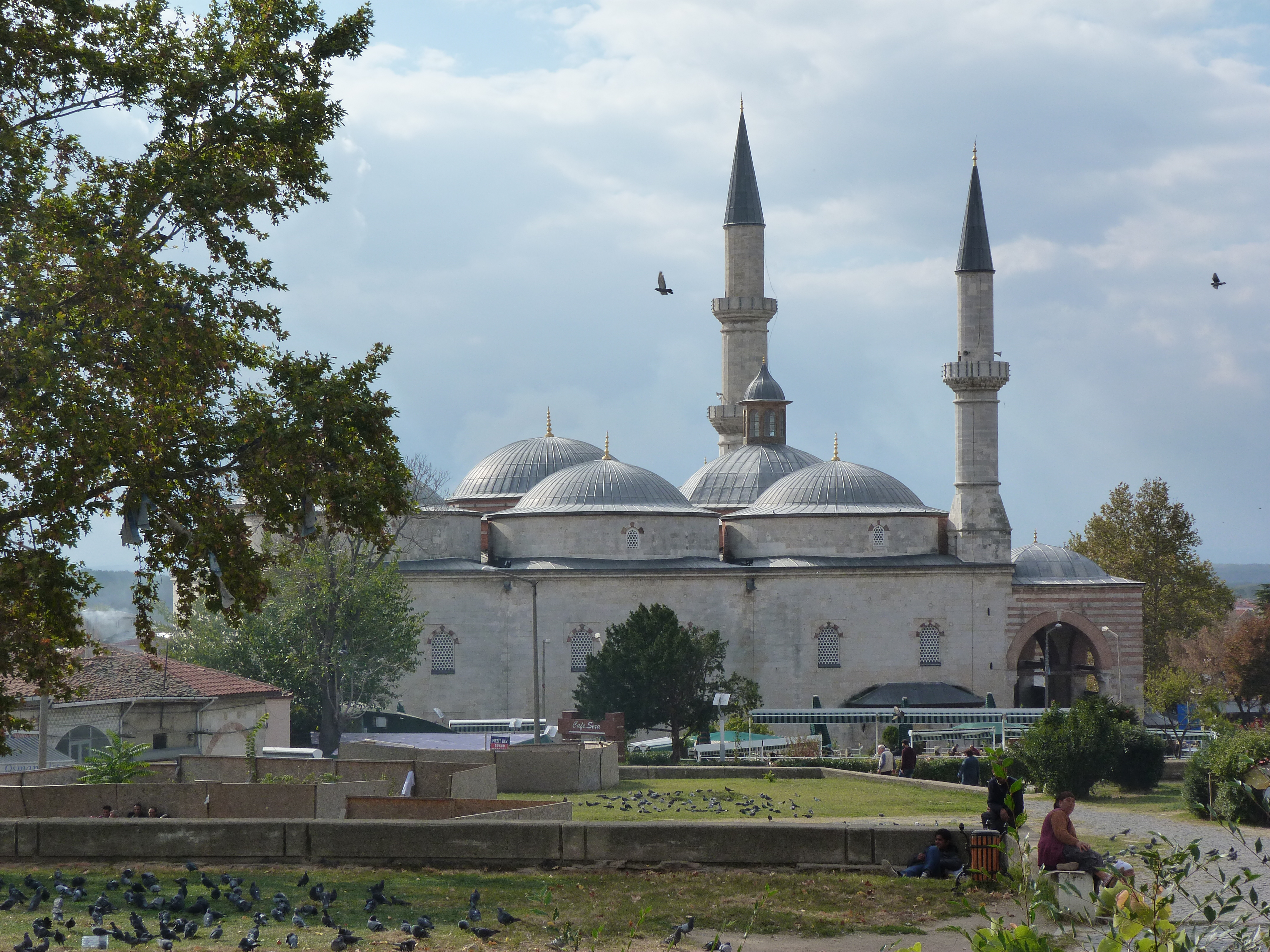 (Eski Mecset). A felvétel 2014. október 22-én, szerdán készült. Edirne, Törökország. Nagymecset. A Nagymecsetet 1414 januárjában szentelték fel. Alapjait Suleyman Celebi rakatta le, majd az építkezést testvérei, Musa Celebi, később Mehmet Celebi folytatta. Az építész Haci Alaaddin, segédje Omer Bin Ibrahim volt. A minaretet Murad szultán idején (1421 – 1448) építették. Az asszonyok páholyát 1612-ben Filibeni Ramazan aga építtette. ©© Derzsi Elekes Andor, Budapest, 2014. A kép egészben, vagy részletekben másolását, bármilyen úton történő sokszorosítását és felhasználását a szerző ellenérték nélkül, jogutódjaira is kihatóan megengedi. Az engedély kiterjed a kereskedelmi célú hasznosításra is. Kéri azonban nevének feltüntetését a felhasználás során. A Metapolisz sorozat valamennyi képe és filmje Creative Commons alatti valamint kereskedelmi - for profit - célra is felhasználható. Ajánlott hivatkozás: Derzsi Elekes Andor: Metapolisz DVD line